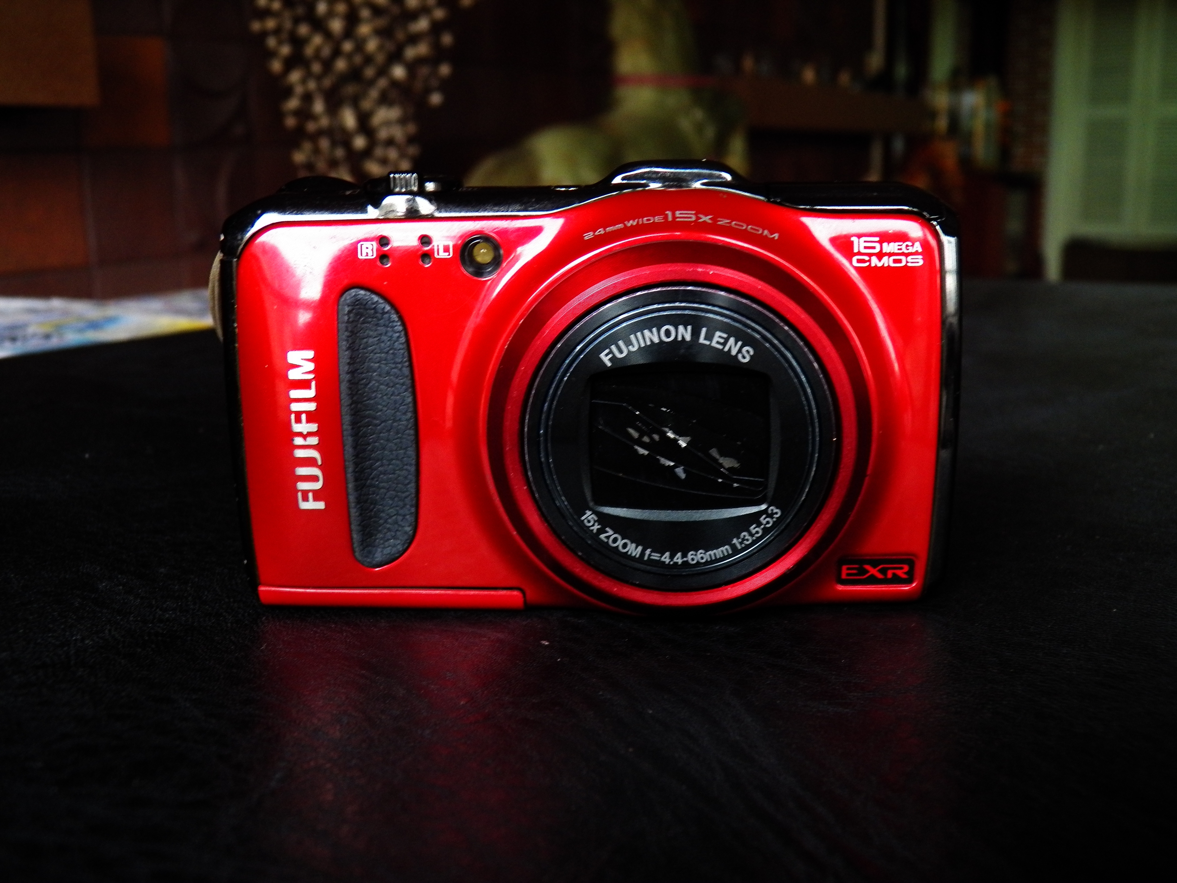 富士FinePix F550EXR，2011年10月5日購入，使用機歷1年6個月。